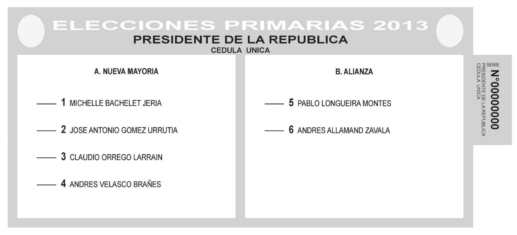 Cédula única de votación para las elecciones primarias presidenciales de 2013, entregada sólo a los votantes que no son miembros de algún partido político.